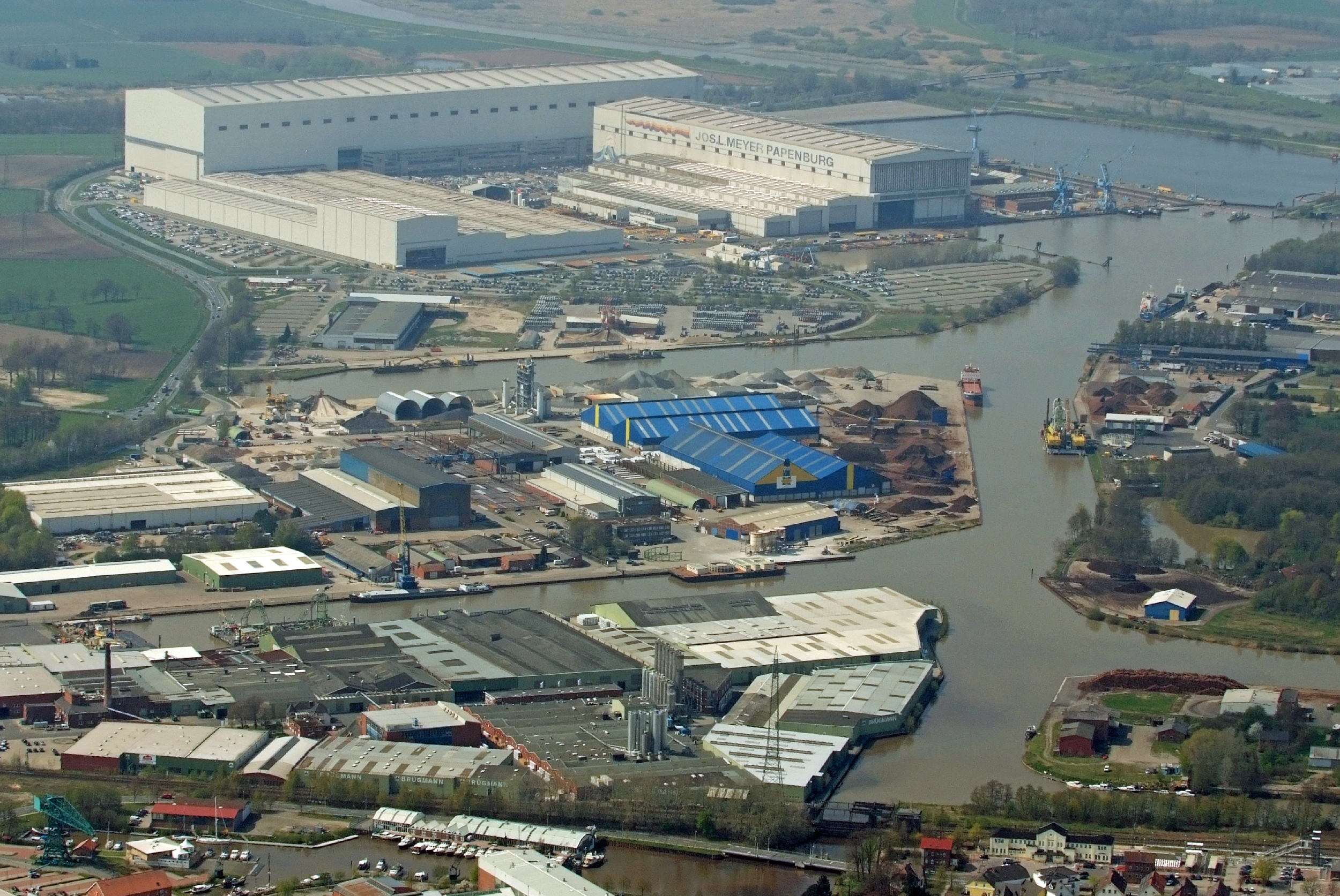 Fotoflug von Nordholz-Spieka nach Oldenburg und Papenburg